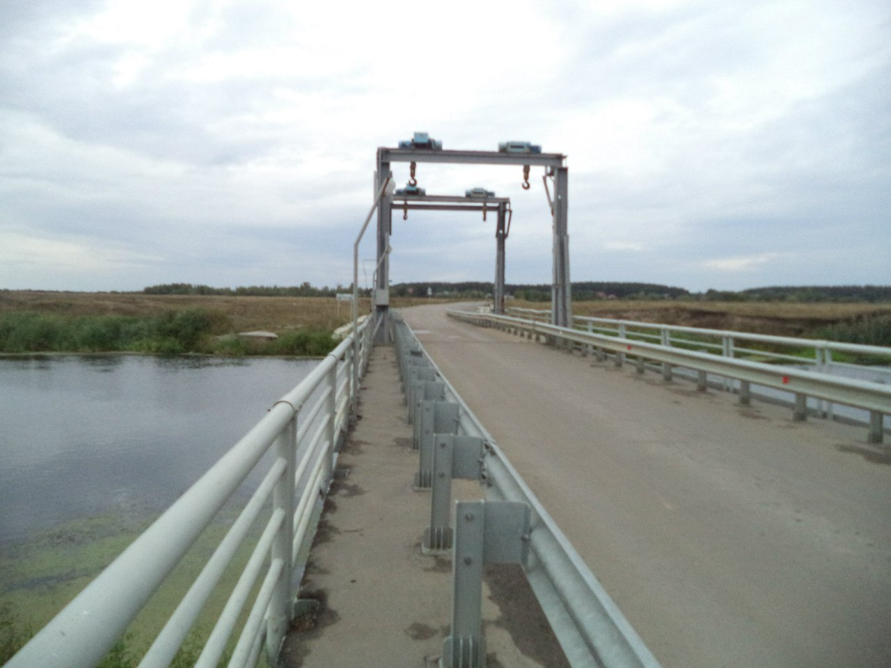 Подвесной мост через реку Цна.